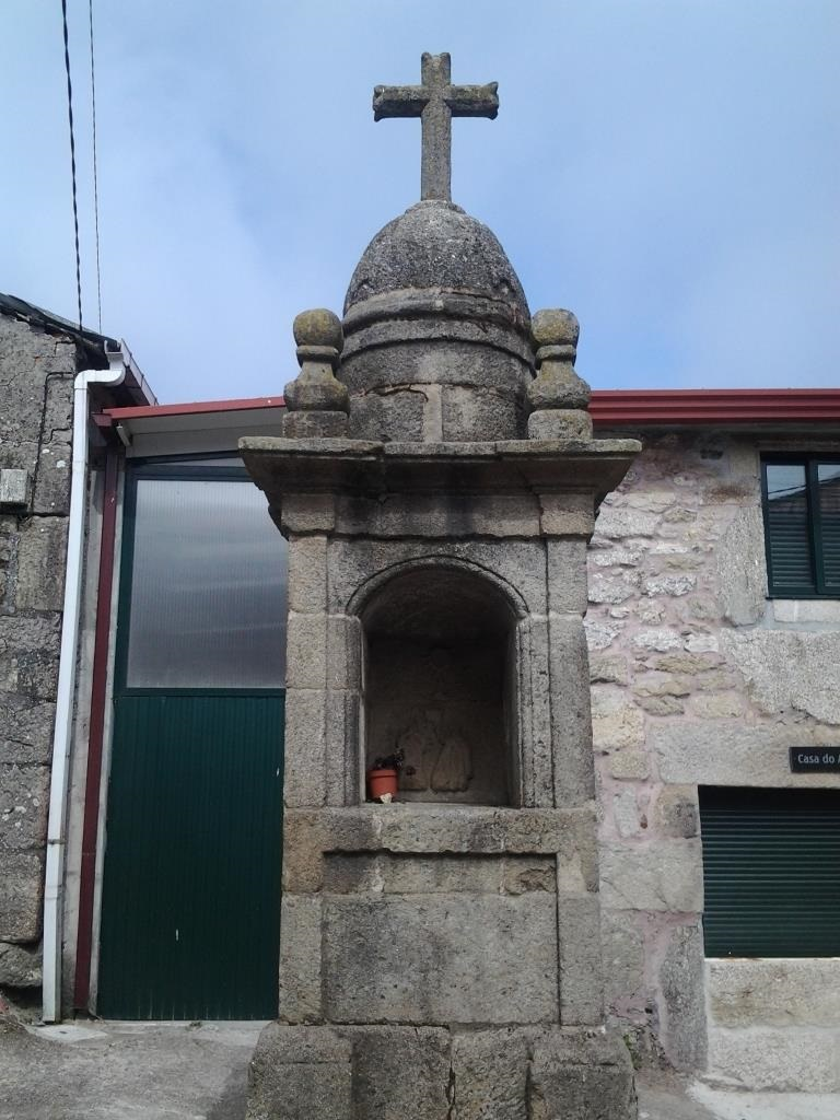 Peto de ánimas de Trasar de Carballo